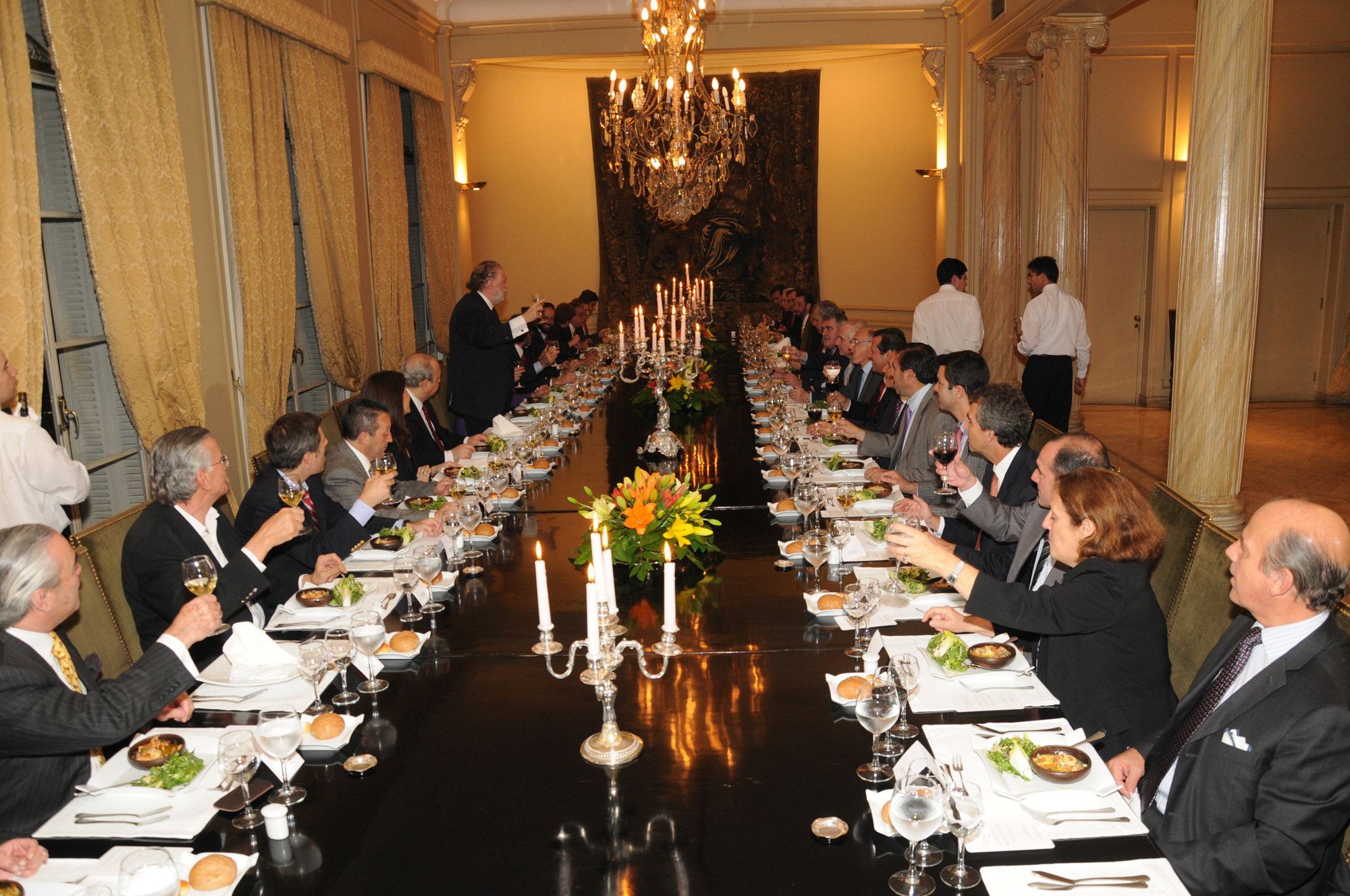 Brindis de los Gobernadores y sus pares chilenos.